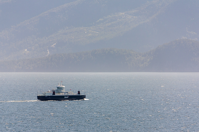 MF Davik på Nordfjord, i rute Stårheim-Isane